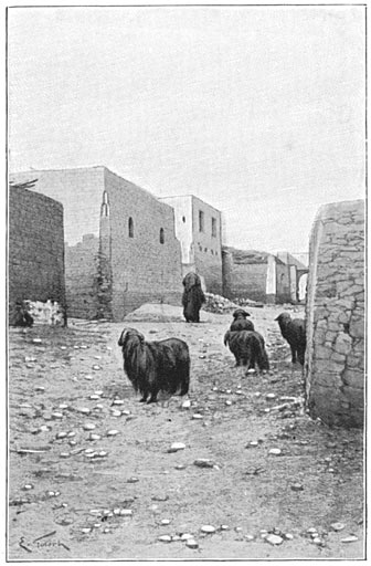 Straat in Abydos